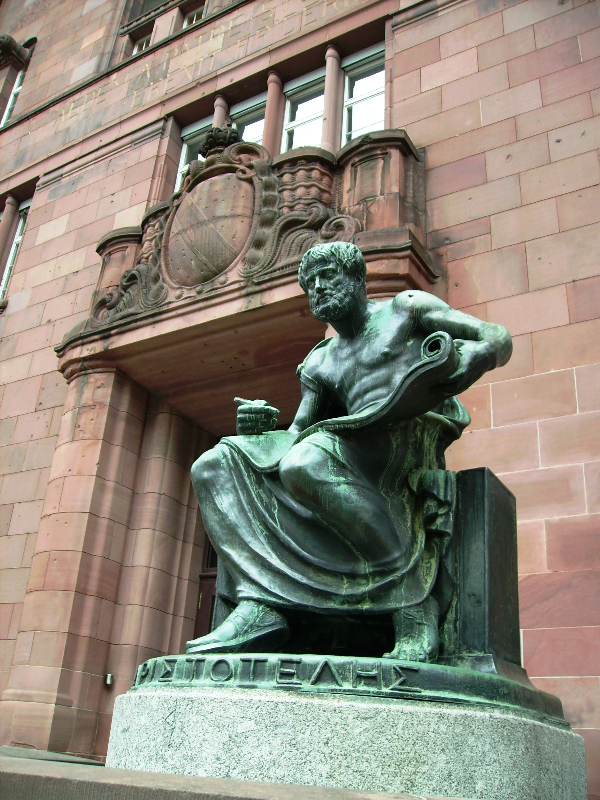 Universität Freiburg i. Br., Kollegiengebäude I: Aristoteles von Cipri Adolf Bermann (Bronze, 1915, aufgestellt 1921, restauriert 2004/05